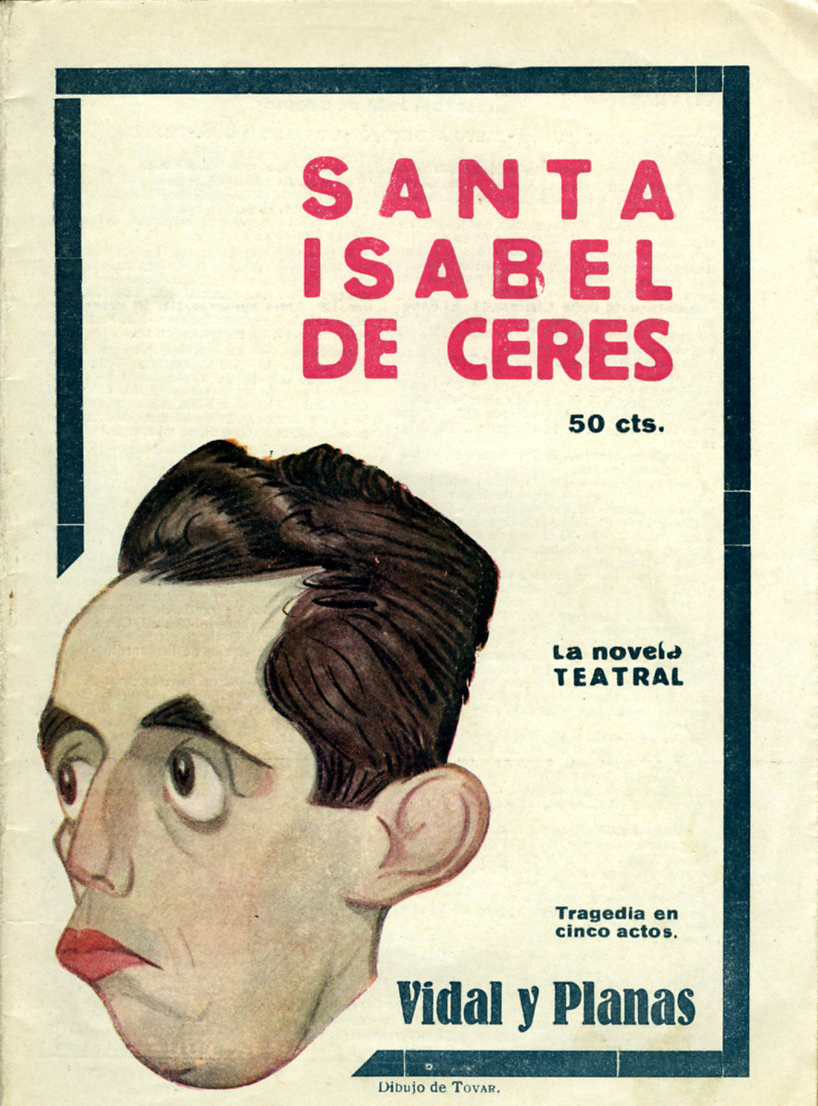 Portada de Santa Isabel de Ceres. Caricatura de Vidal y Planas.